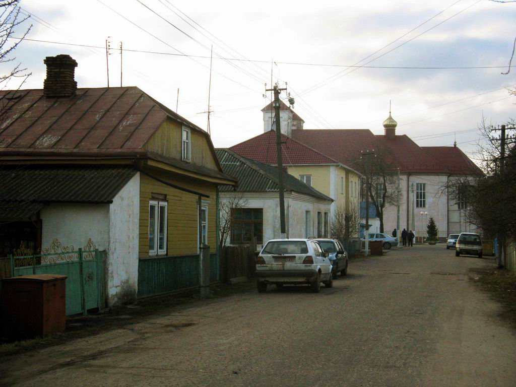 Беларуская (тарашкевіца): Клецак